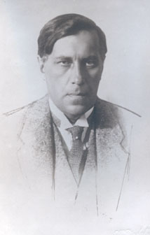 Andreas Bjerre, rootsi õigusteadlane ja psühholoog